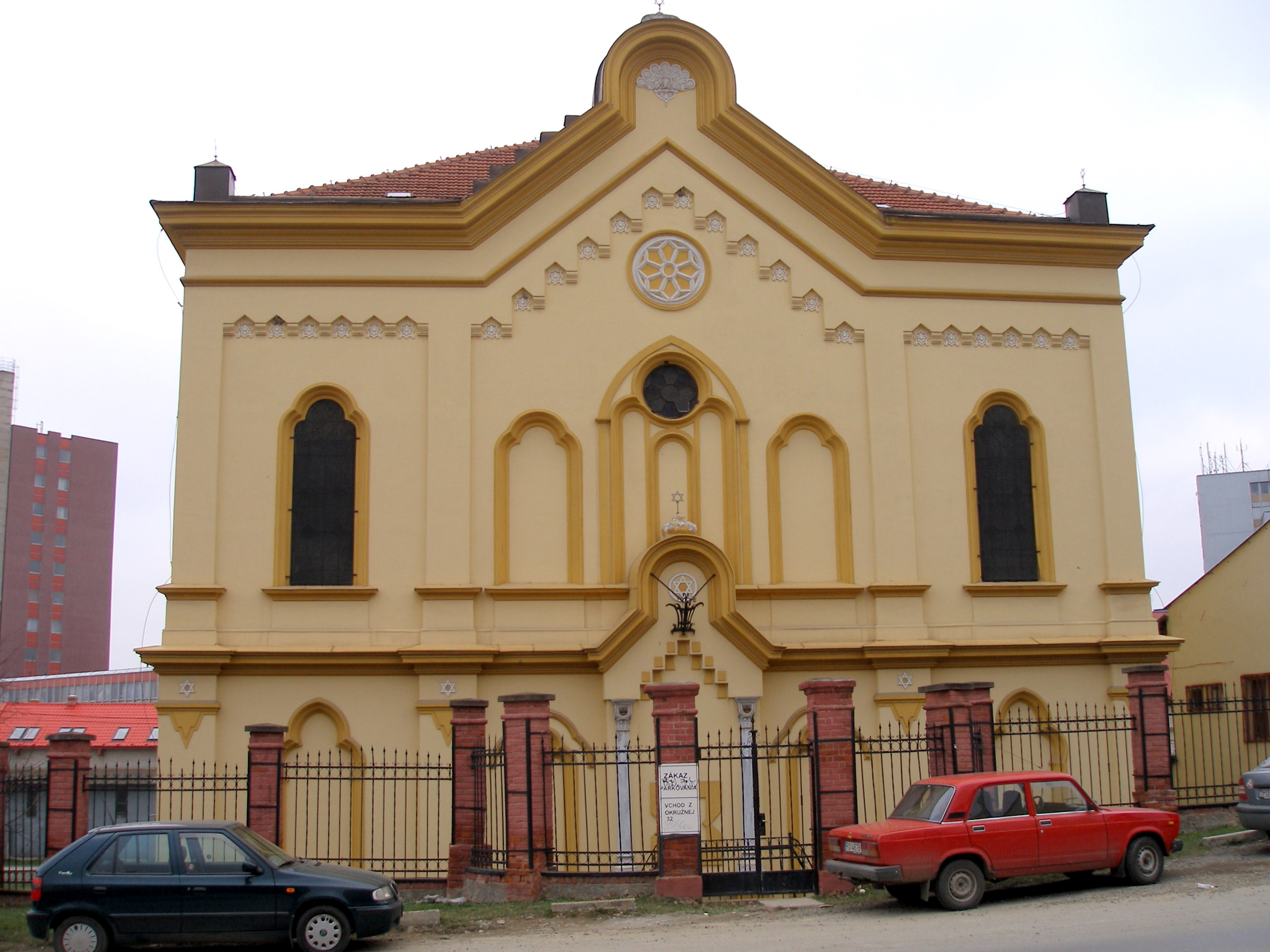 Prešov, mestské pamiatky. Východná strana židovskej ortodoxnej synagógy.